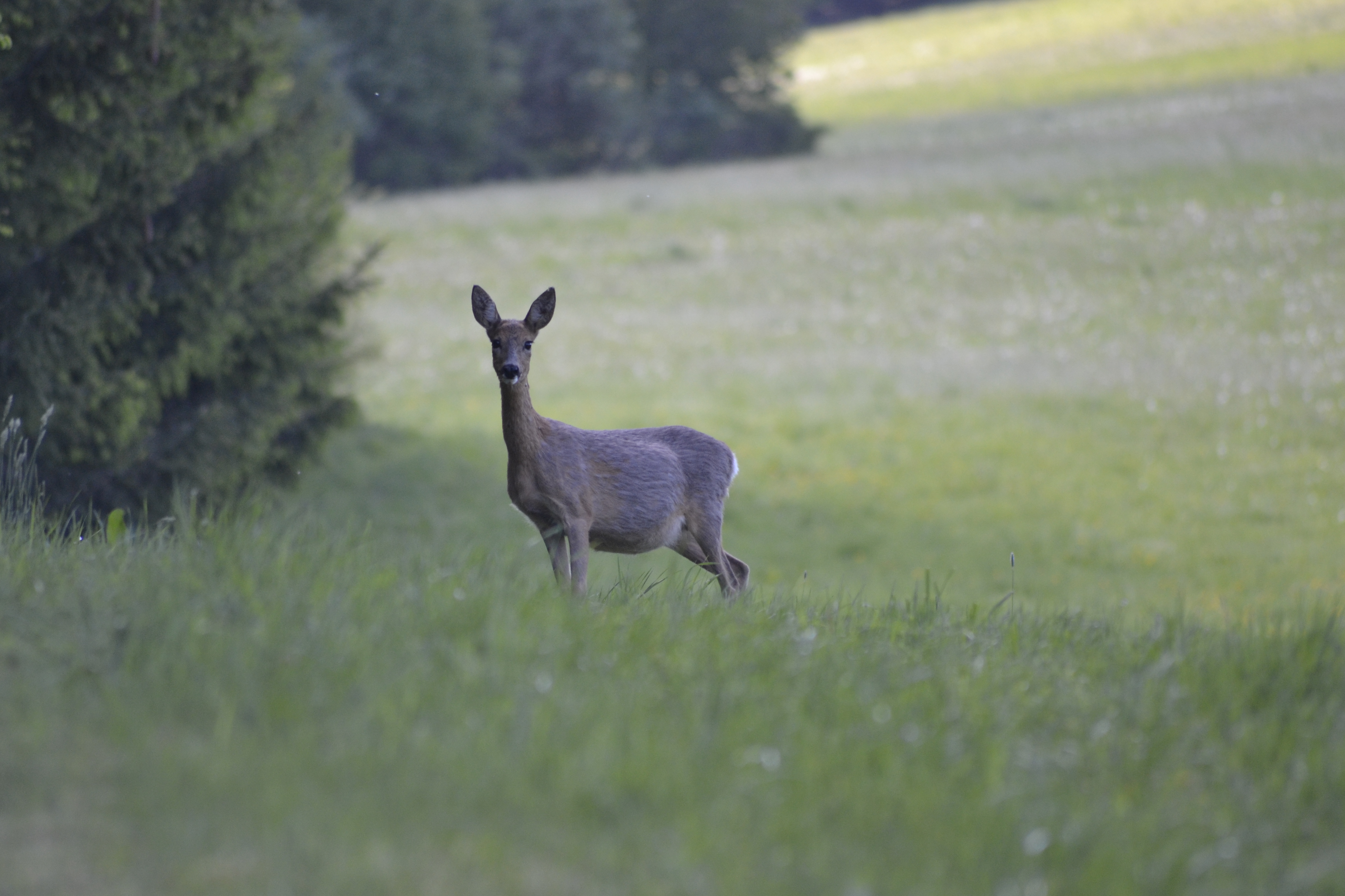 Ein Reh steht am Waldrand und beobachtet.